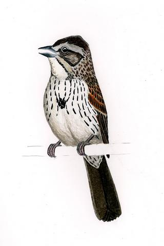 Xenospiza baileyi (en: Sierra Madre Sparrow)